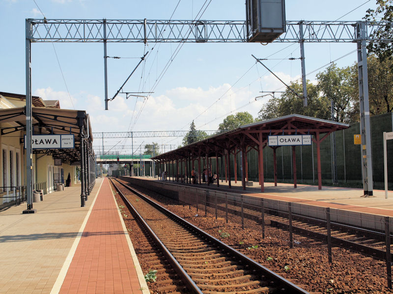 Zmodernizowane perony na stacji Oława.